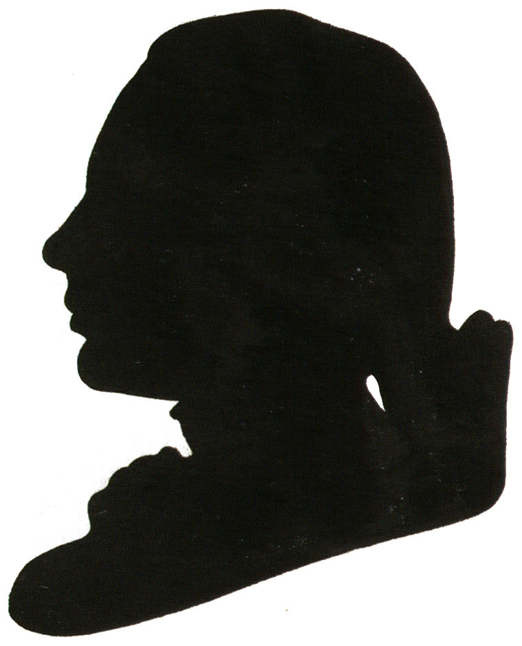 silhouette of Johann Friedrich Hugo von Dalberg from the Silhouetten-Sammlung Schubert